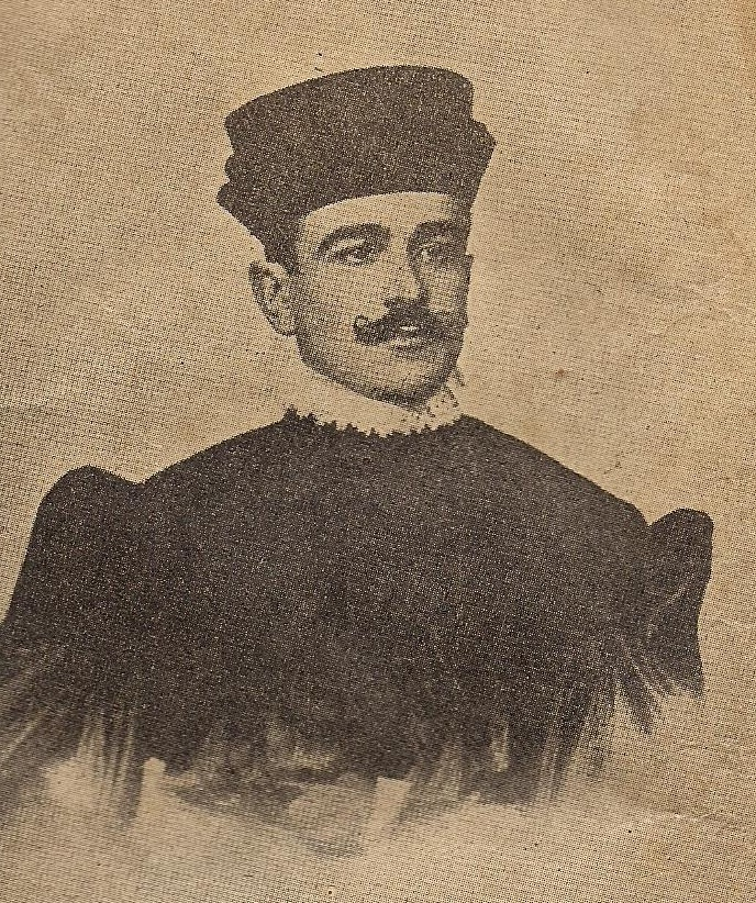 Formatura de Getúlio Vargas em Direito, ano de 1907.